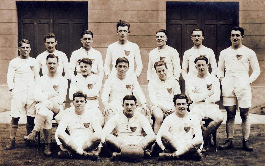 Équipe de l'AS Montferrand en 1925. Michel Boucheron assis au 1er rang à gauche à côté de Marmayou et de Chaumont à droite.